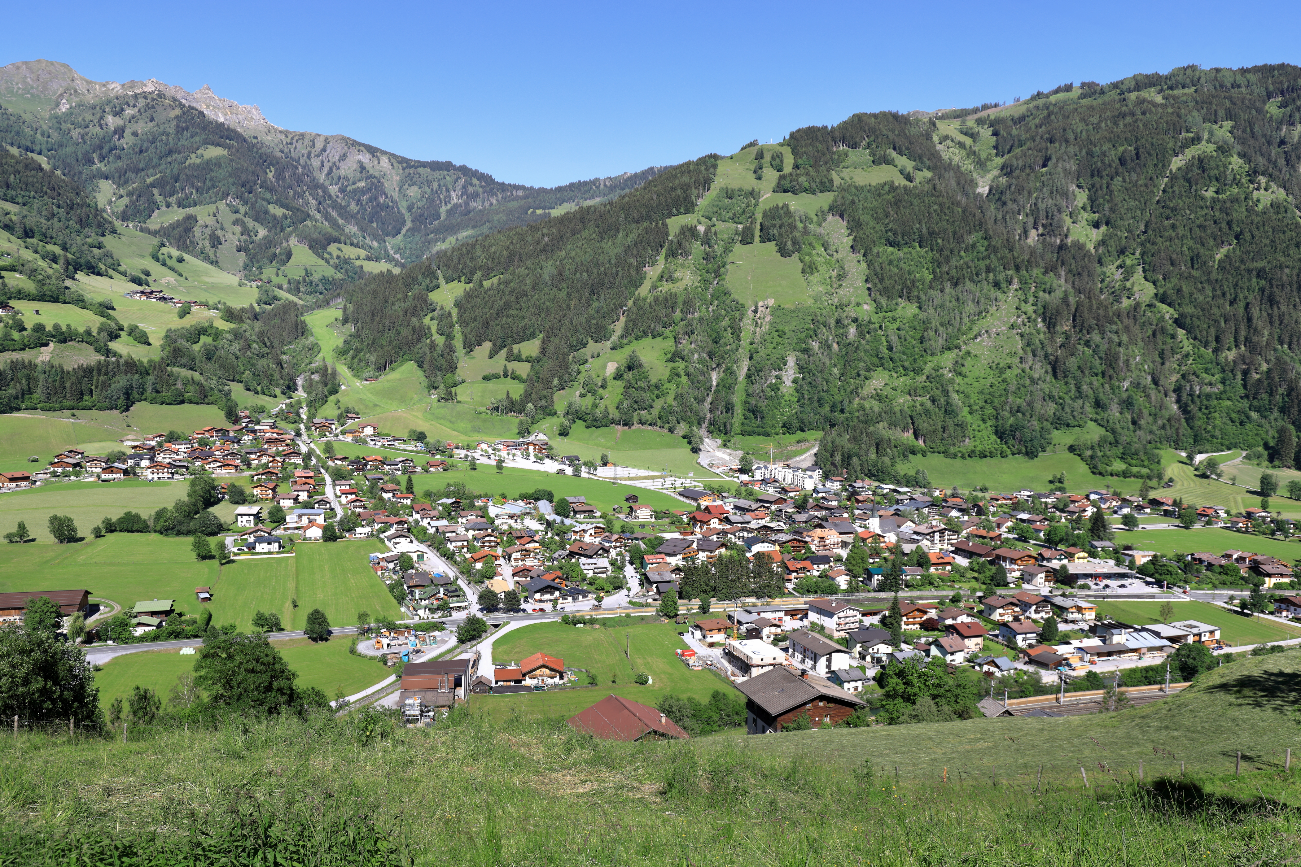 Westansicht des Ortszentrums der Salzburger Gemeinde Dorfgastein.